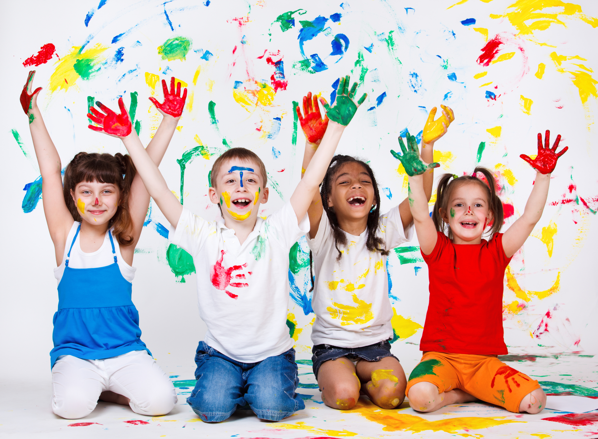 Grupo de niños disfrutando de una actividad extraescolar.